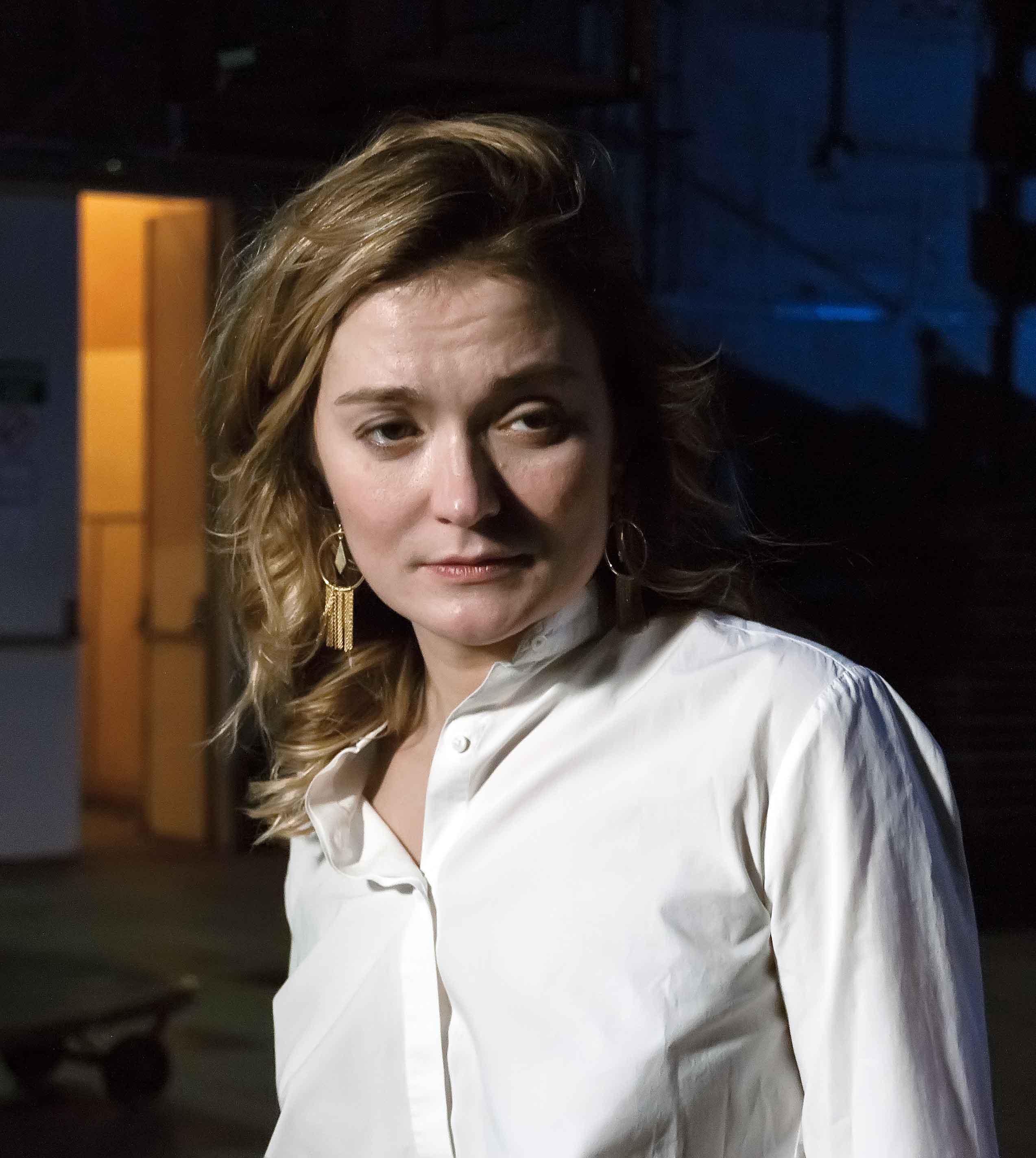 спектакль